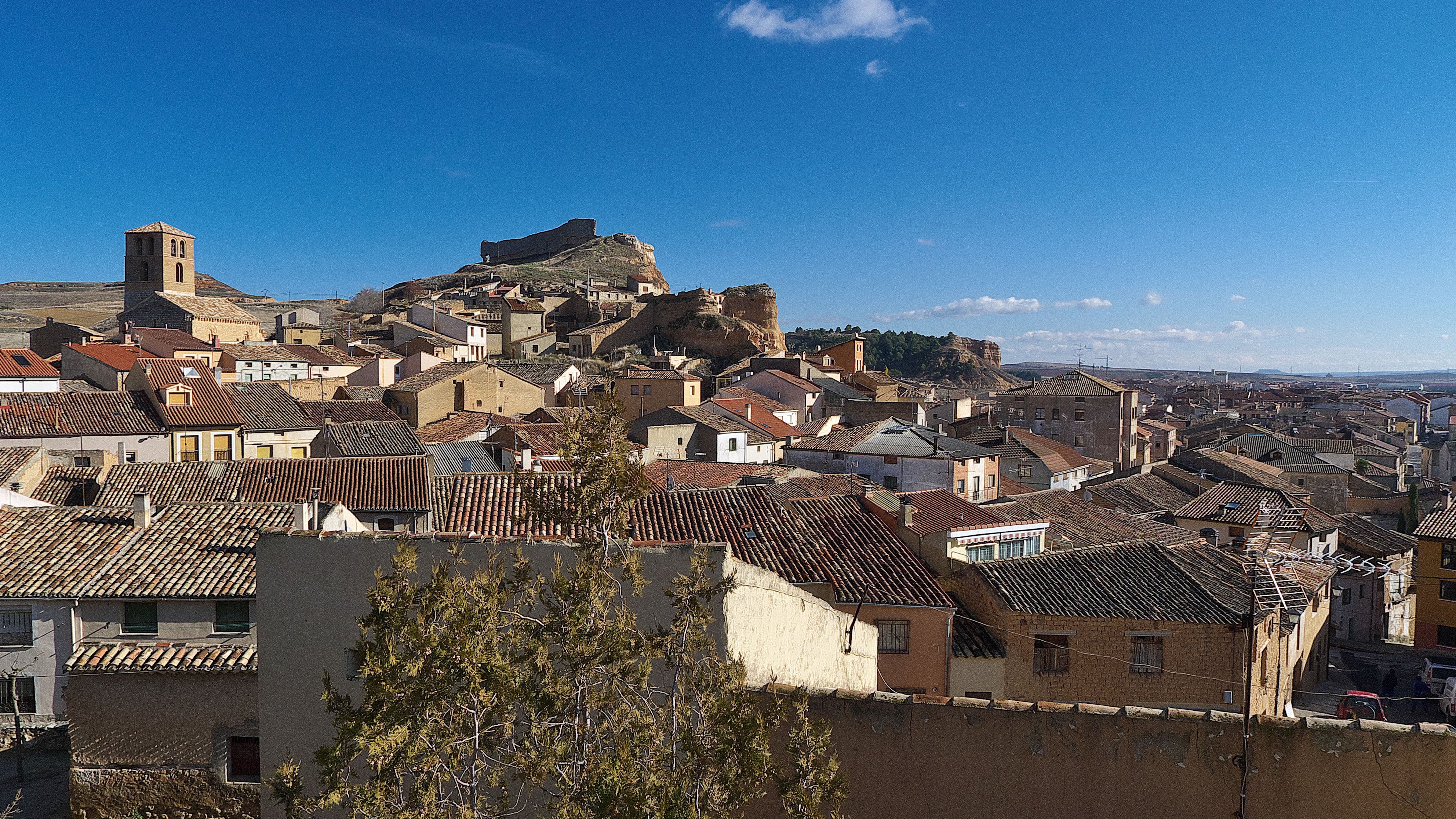 Panorámica de San Esteban de Gormaz